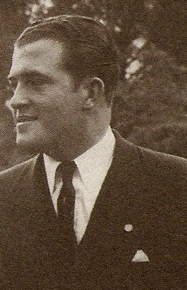 Miguel Ángel Burelli Rivas (1922-2003), político y diplomático venezolano.